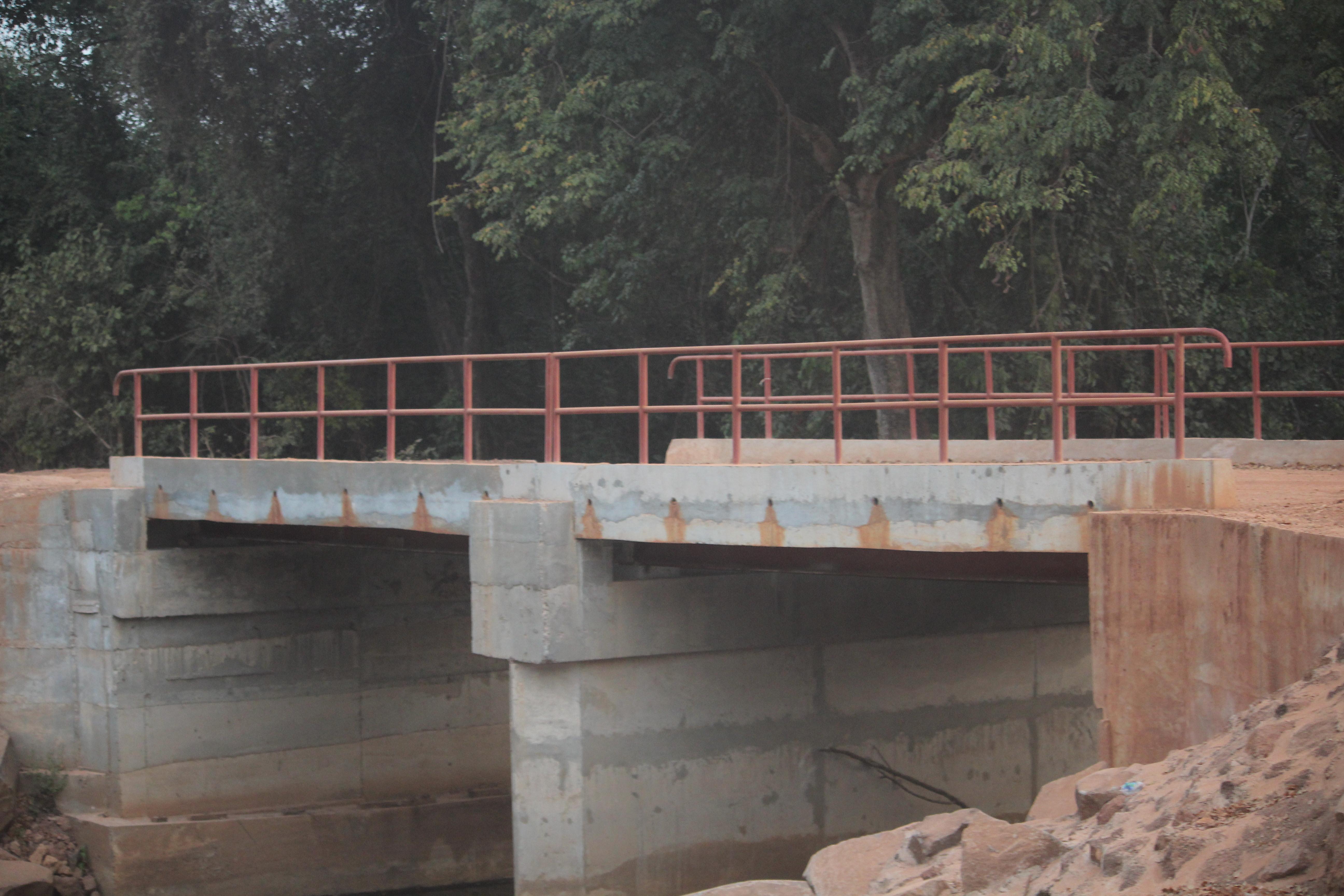 Pont de Nbagou Mali (Ville) This is an image with the theme "Africa on the Move or Transport" from: Guinea